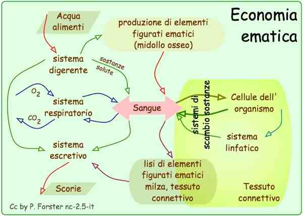 Grafica: Medicina: Patologia, Fisiologia, Anatomia: Ematologia: economia, ematica, approvvigionamento, smaltimento, sostanze, produzione, elementi, figurati, ematici, lisi, sangue, sostanze, solute, sistema cardiocircolatorio, sistema linfatico, tessuto connettivo, medicina popolare, complementare, laica, non convenzionale